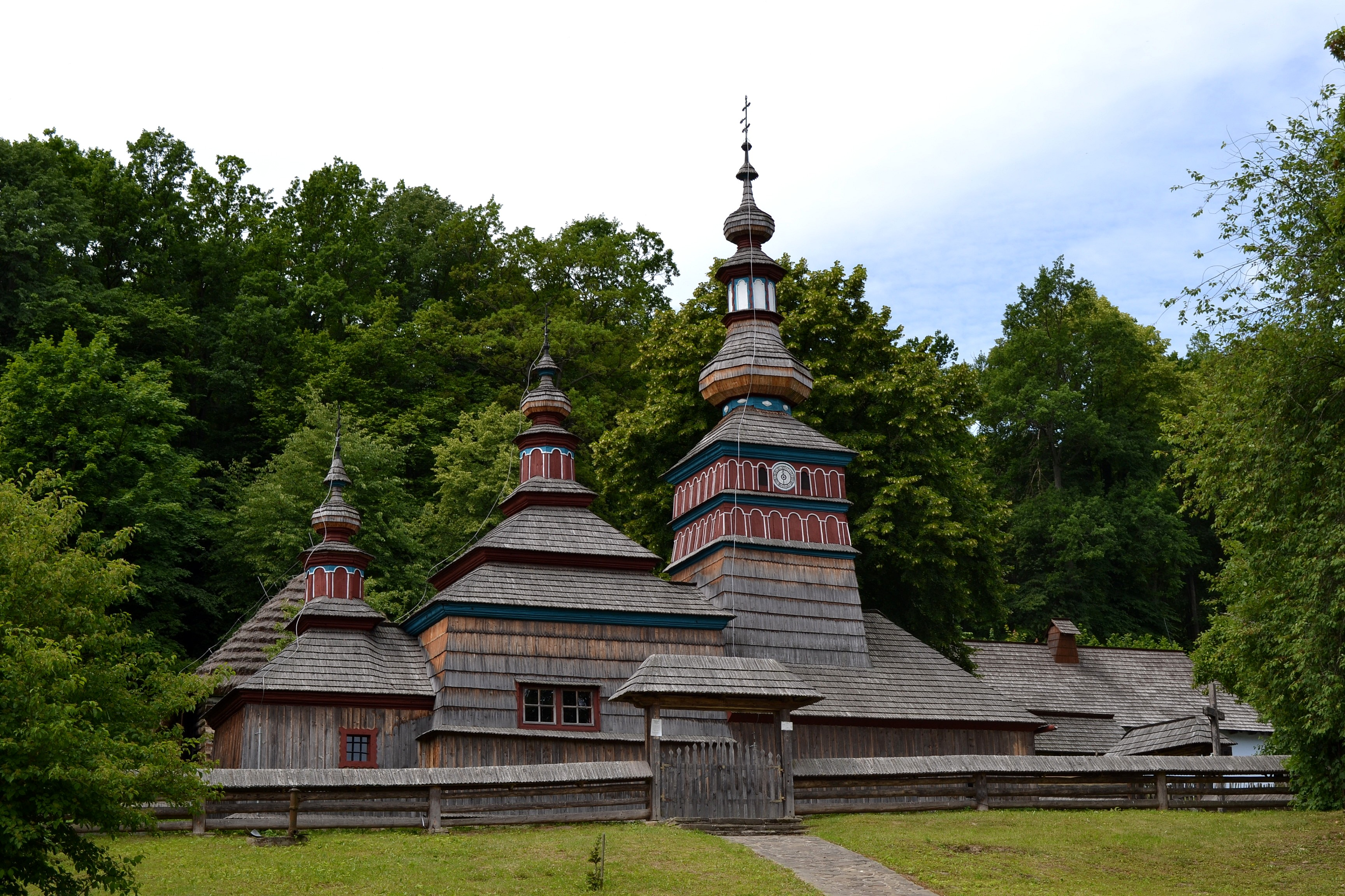 Chrám Ochrany Presvätej Bohorodičky z Mikulášovej (okr. Bardejov); celkový pohľad